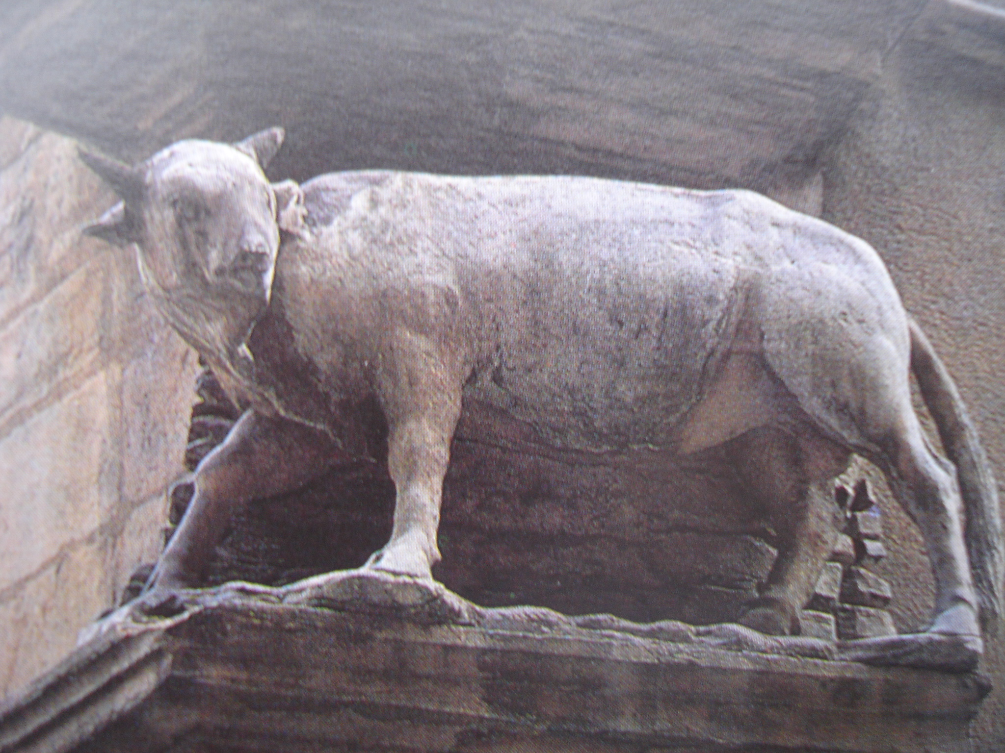 Lyon : taureau de pierre sculpté rue du boeuf